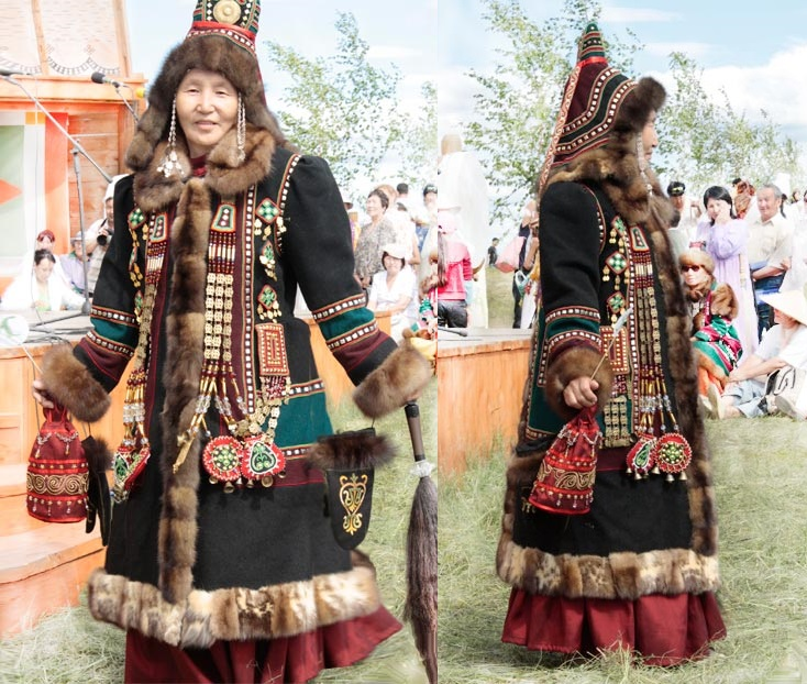 ნაციონალური საქორწინო შუბა